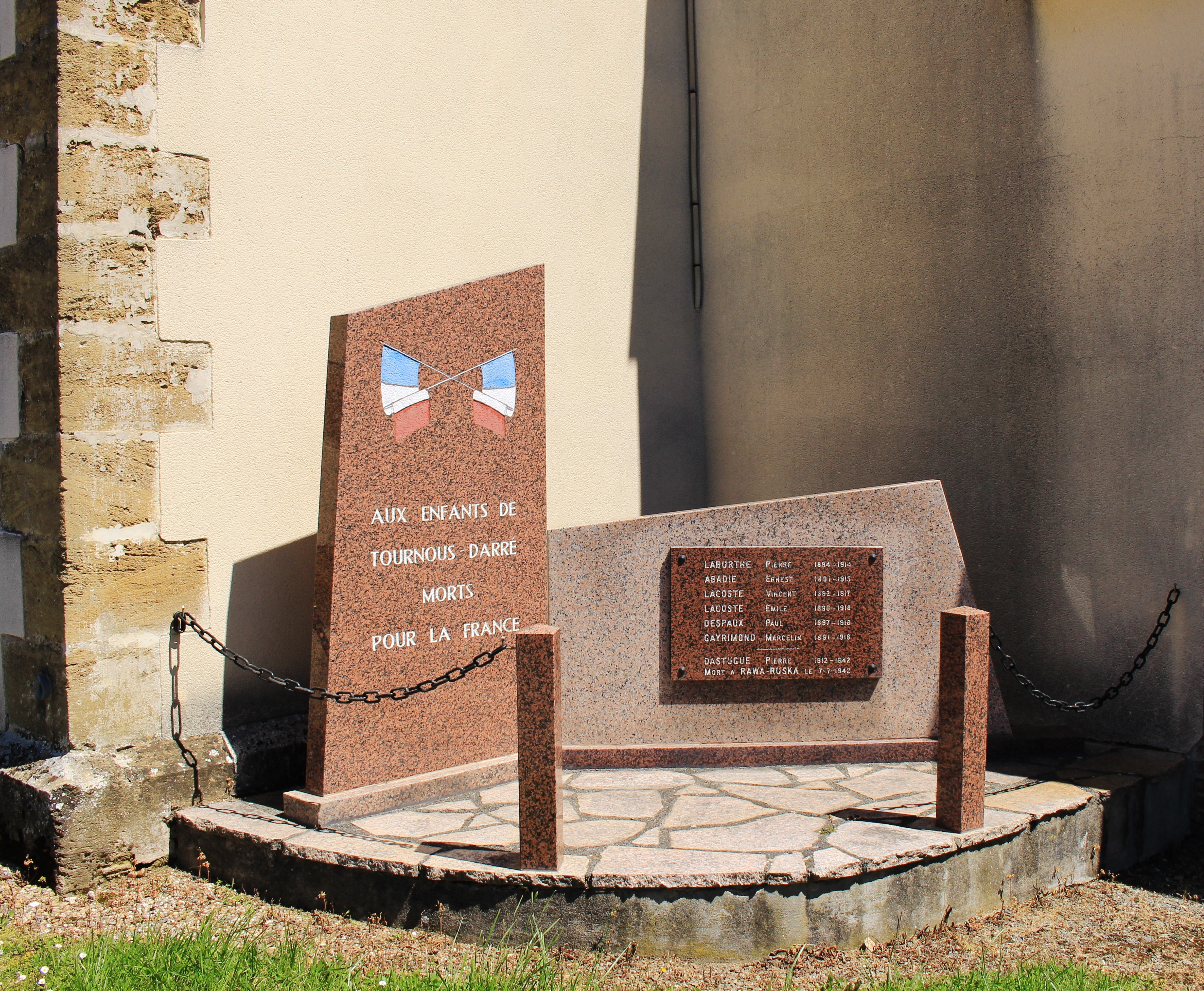 Monument aux morts de Tournous-Darré (Hautes-Pyrénées)